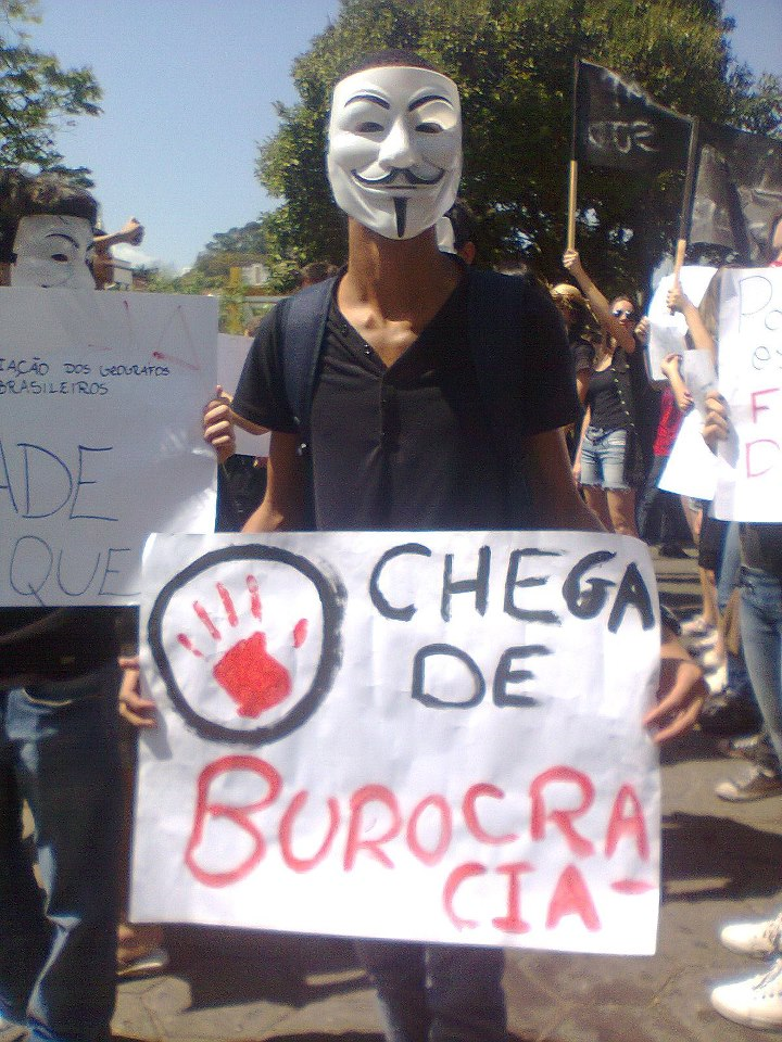 Homem protesta contra Nivaldo de Andrade em São João del Rei